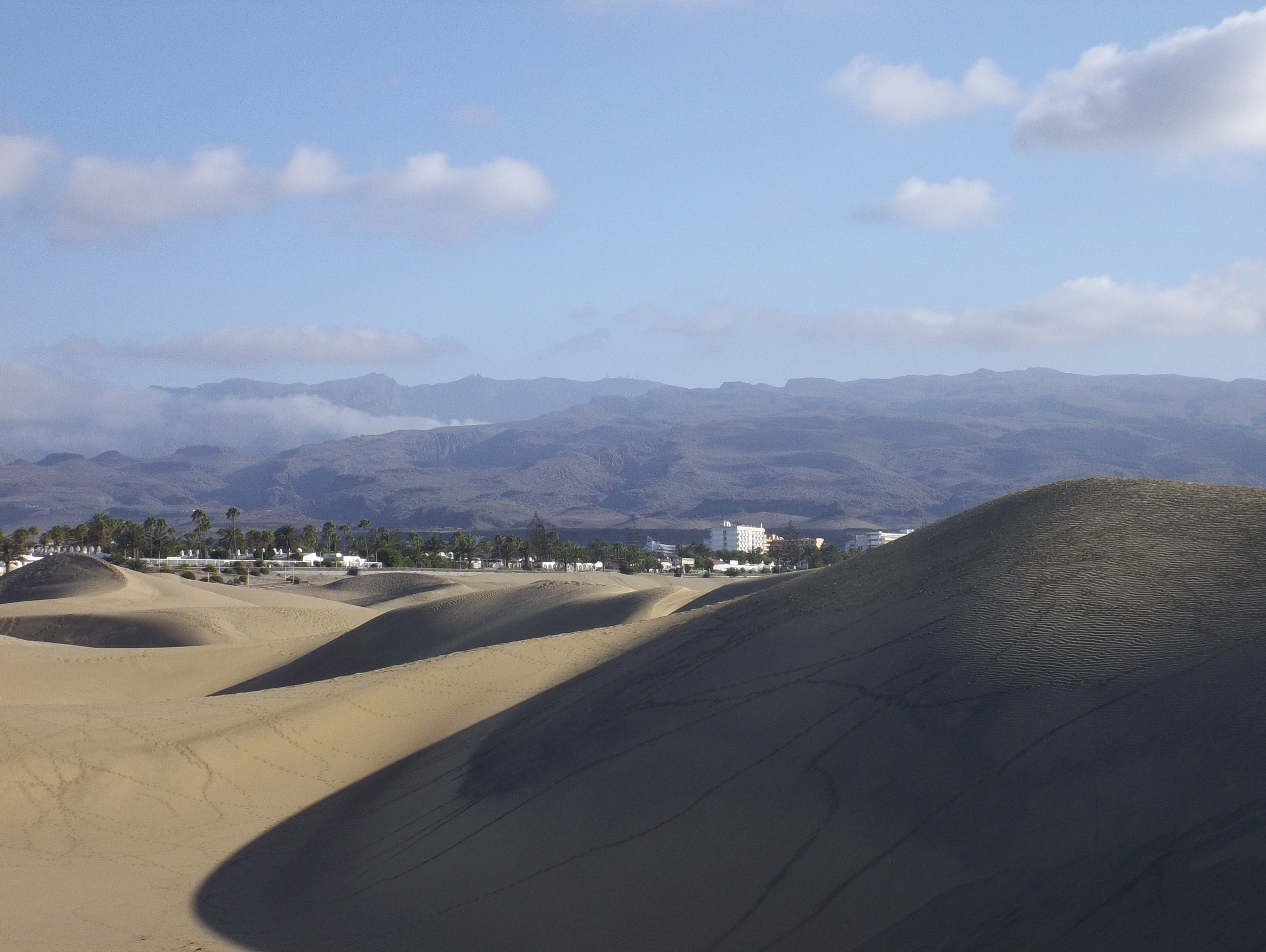 Gran Canaria hier Maspalomas auf den Kanarischen Inseln